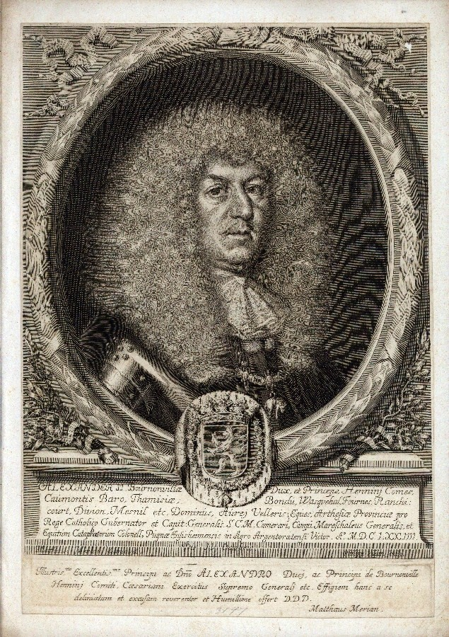 Herzog Alexandre II. Hyppolyte Balthasar de Bournonville († 1690) , Inhaber der Duché Bournonville, Ritter des Ordens vom Goldenen Vlies